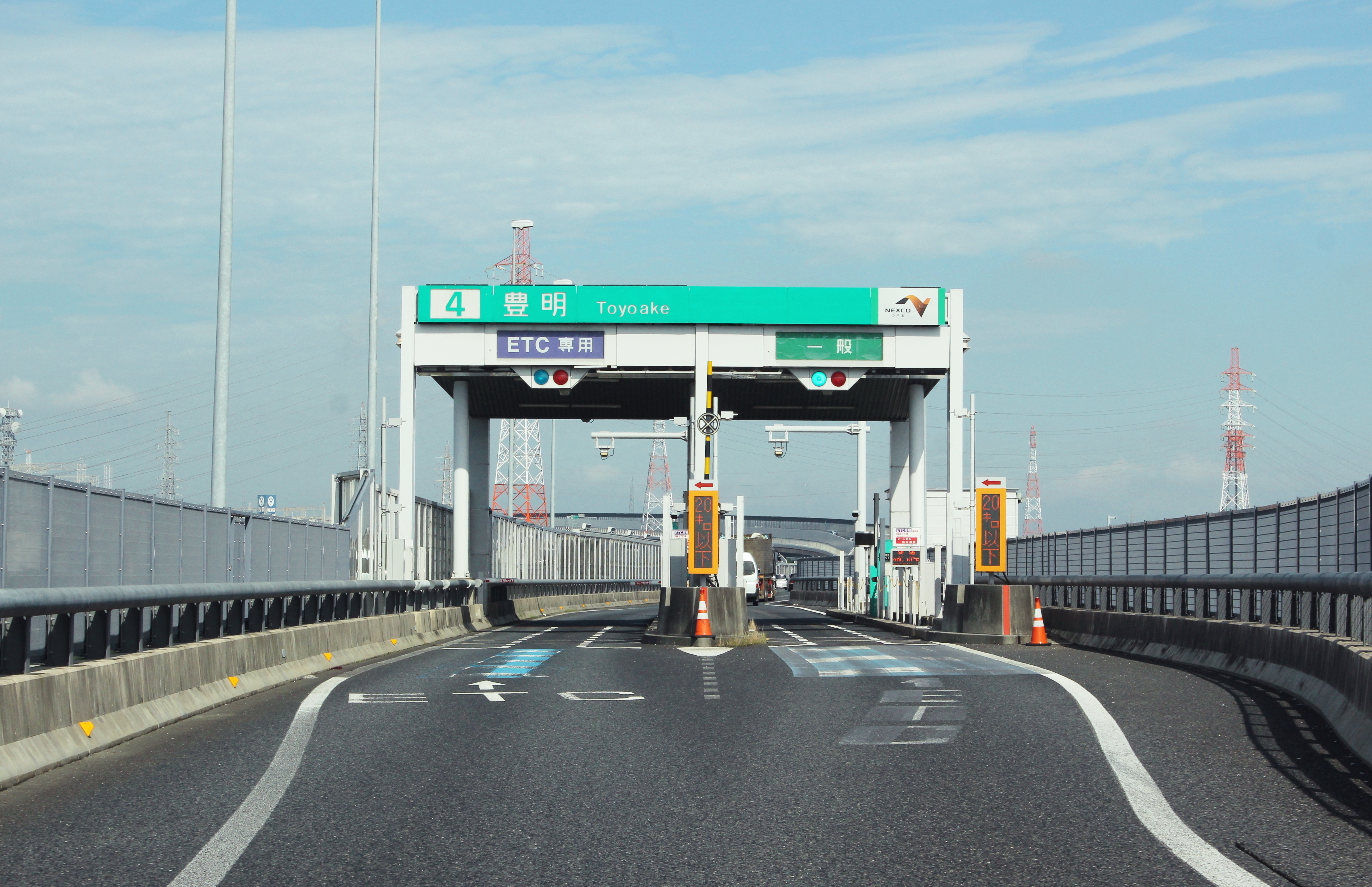 伊勢湾岸自動車道 豊明IC料金所